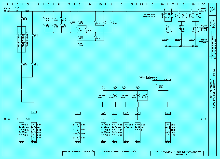 Lógica Cableada Esquema A3 o A4